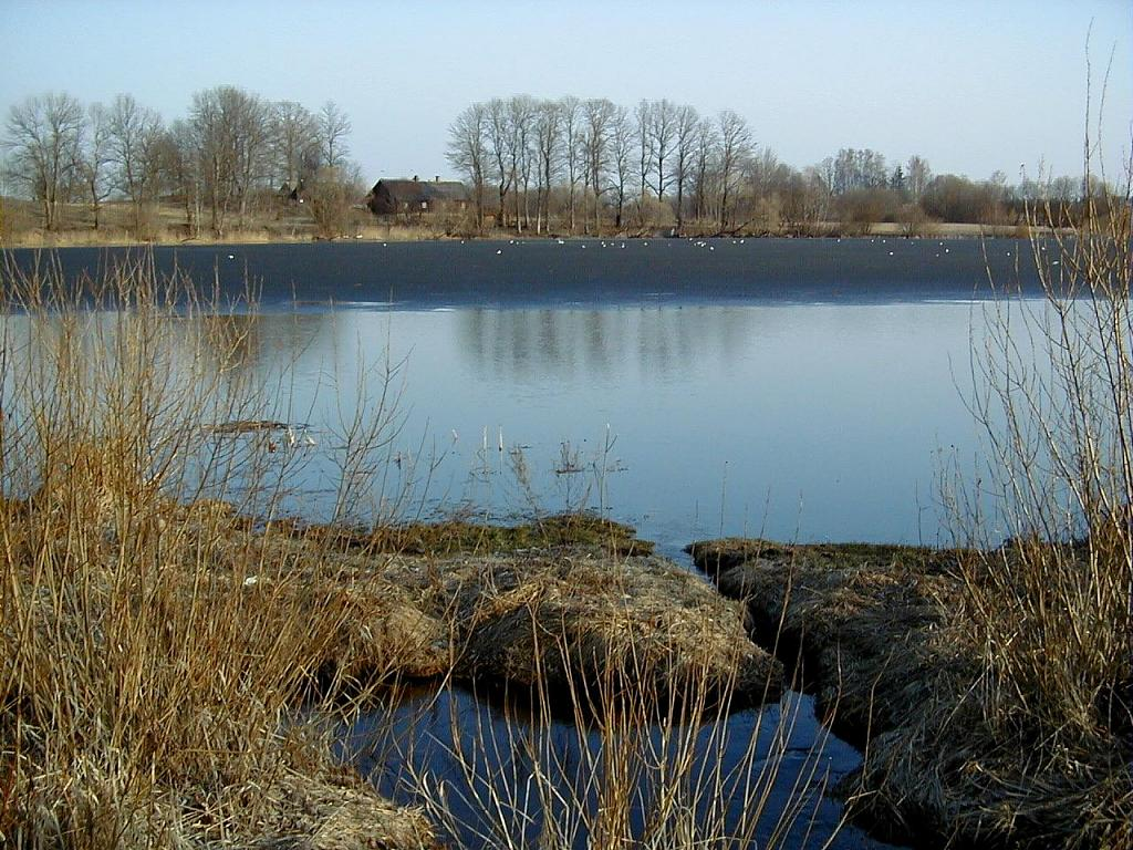 Bakānu ezers 2003-04-18